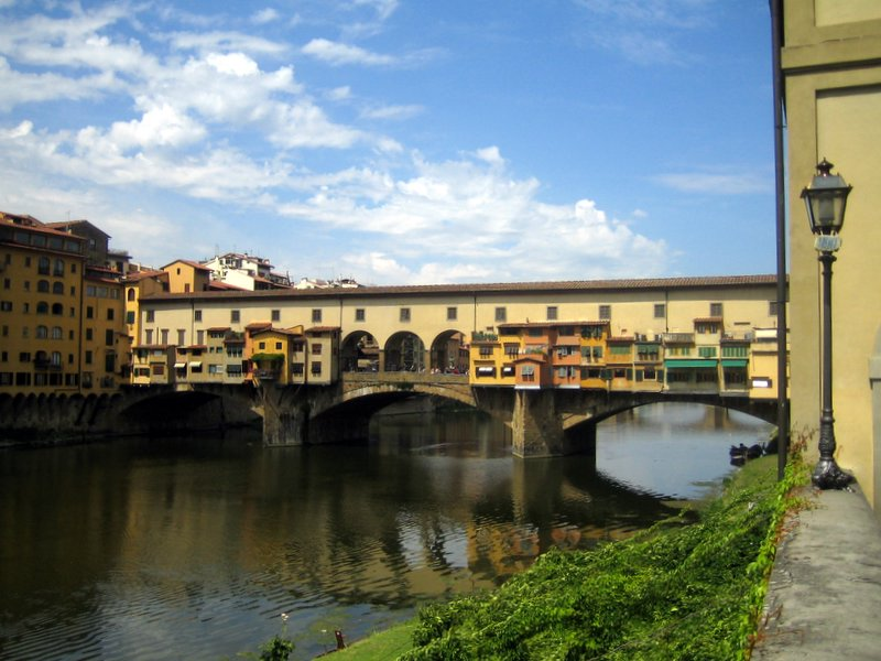 Cartolineeeeeee, Ponte Vecchio